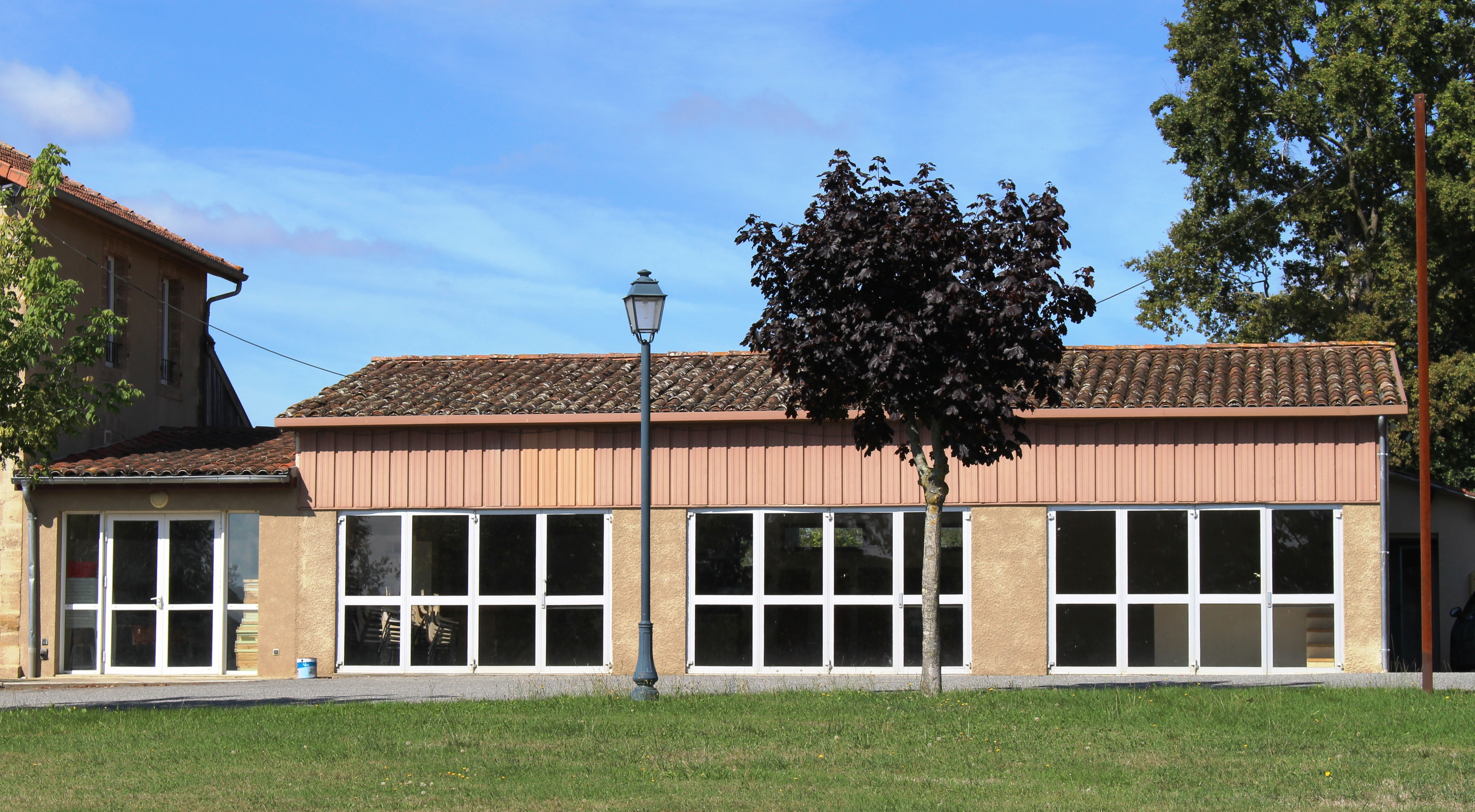 Salle des fêtes de Lalanne (Hautes-Pyrénées)